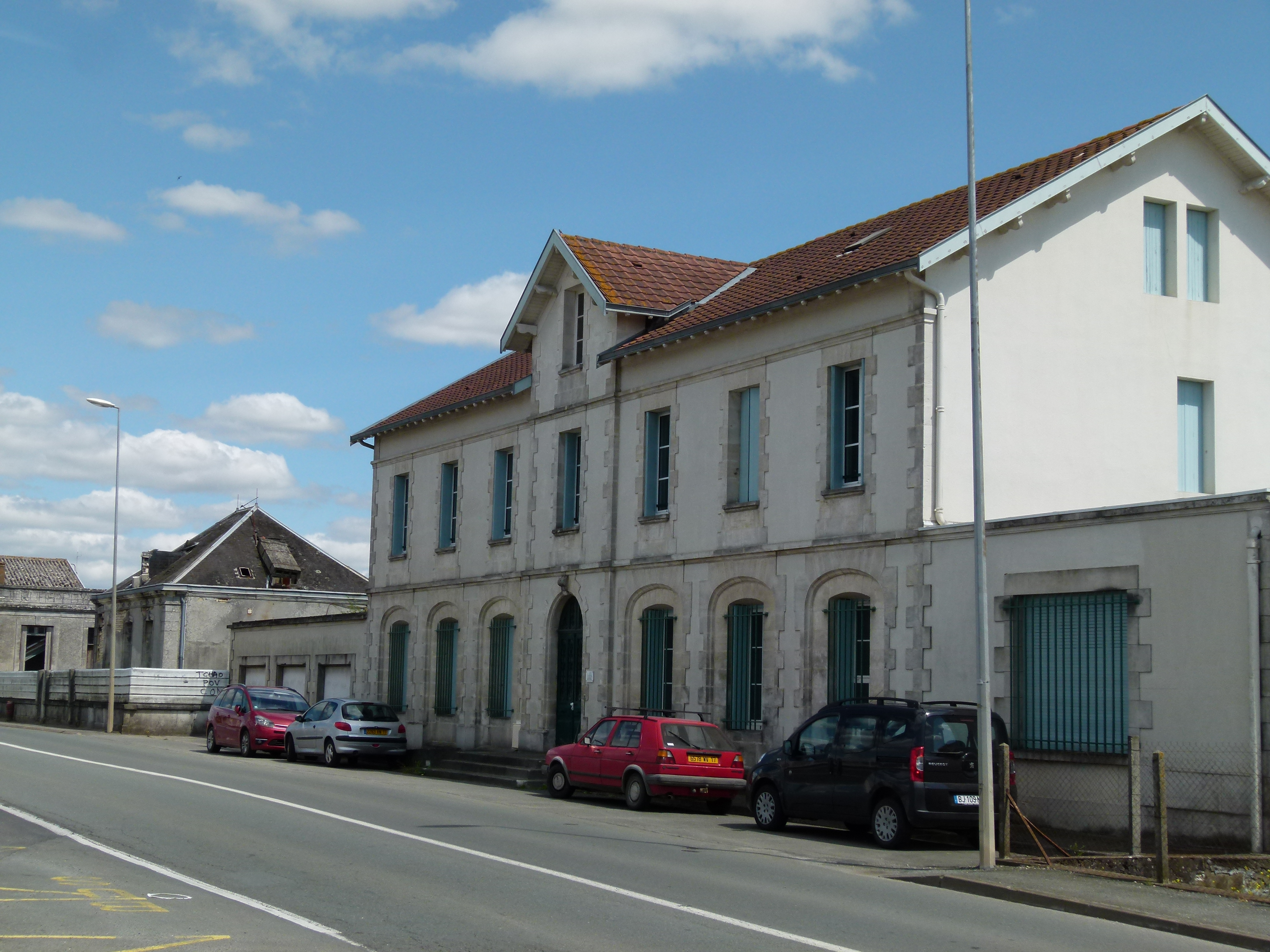 L'institut d'art chorégraphique de Surgères occupe un ancien édifice du début du XXe siècle dans le quartier de la gare.